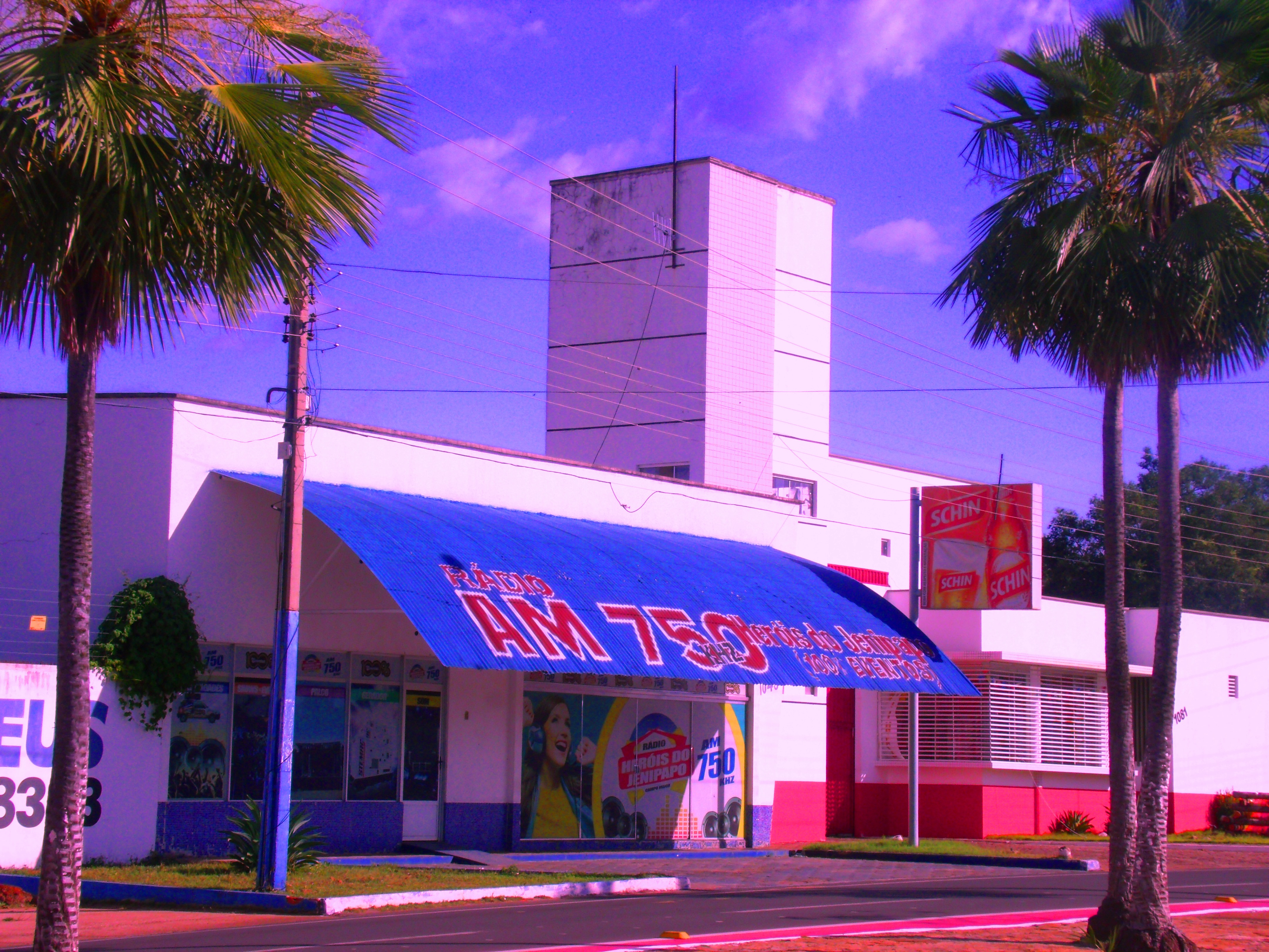 Prédio da Rádio Heróis do Jenipapo, em Campo Maior, no Piauí.